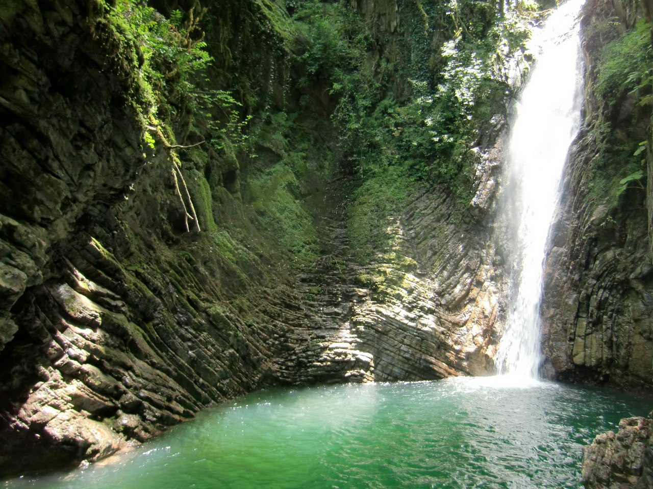 Один из водопадов на реке Бзогу